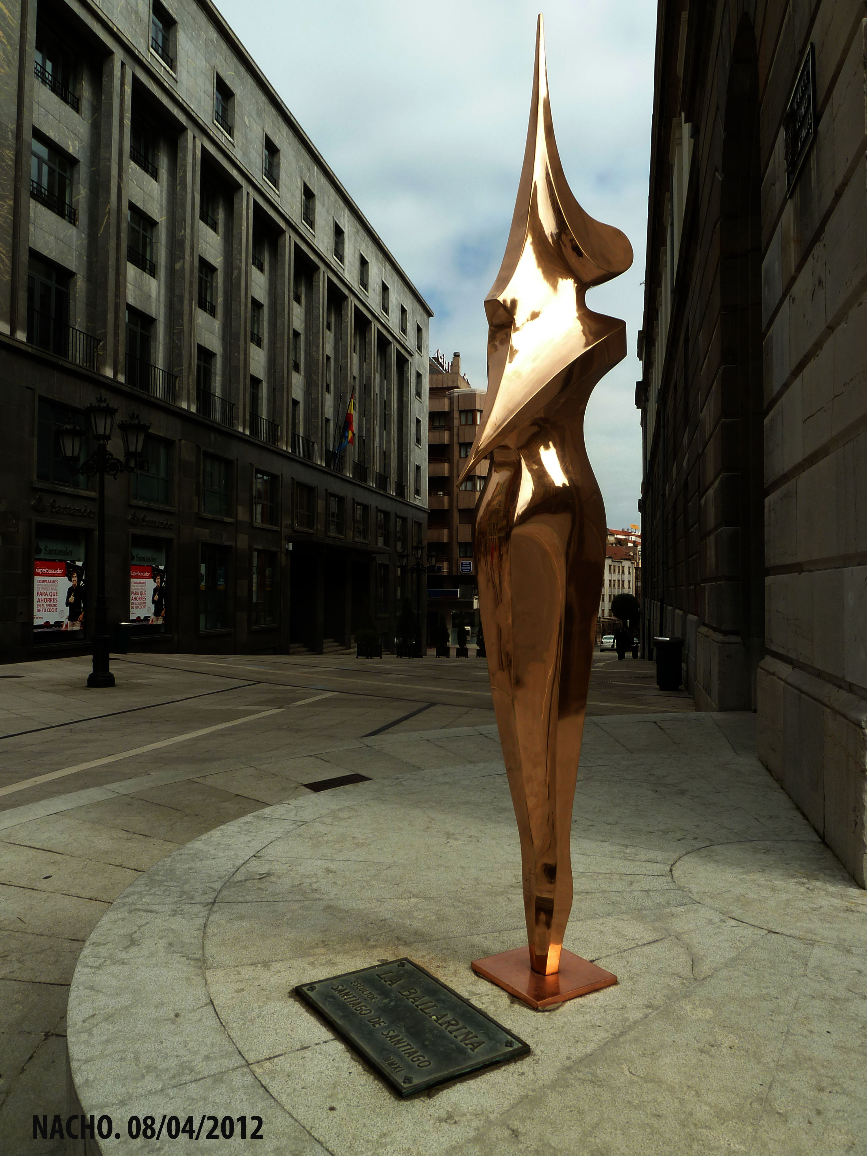 Oviedo